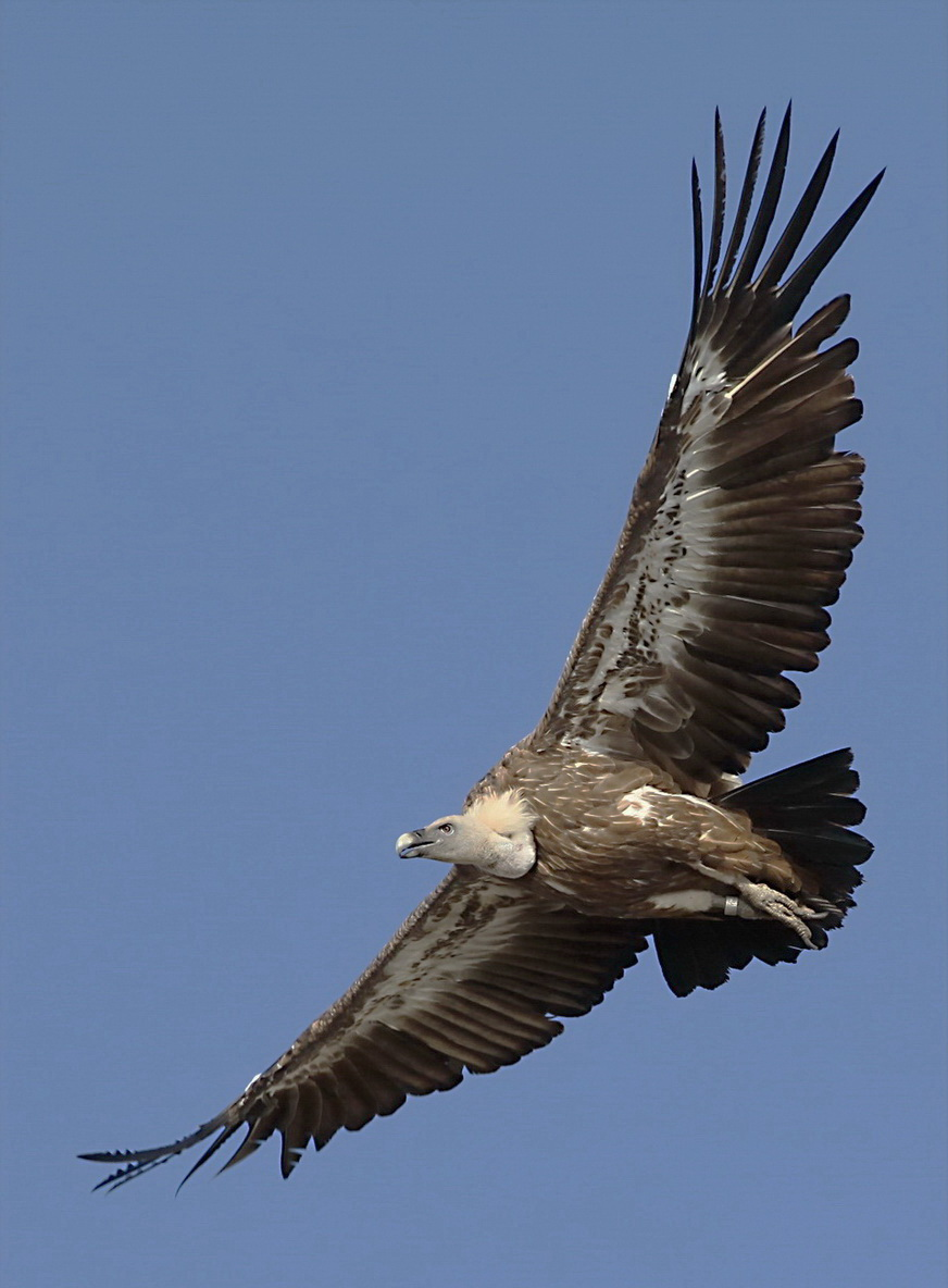 Bjeloglavi sup Gyps fulvus Cres